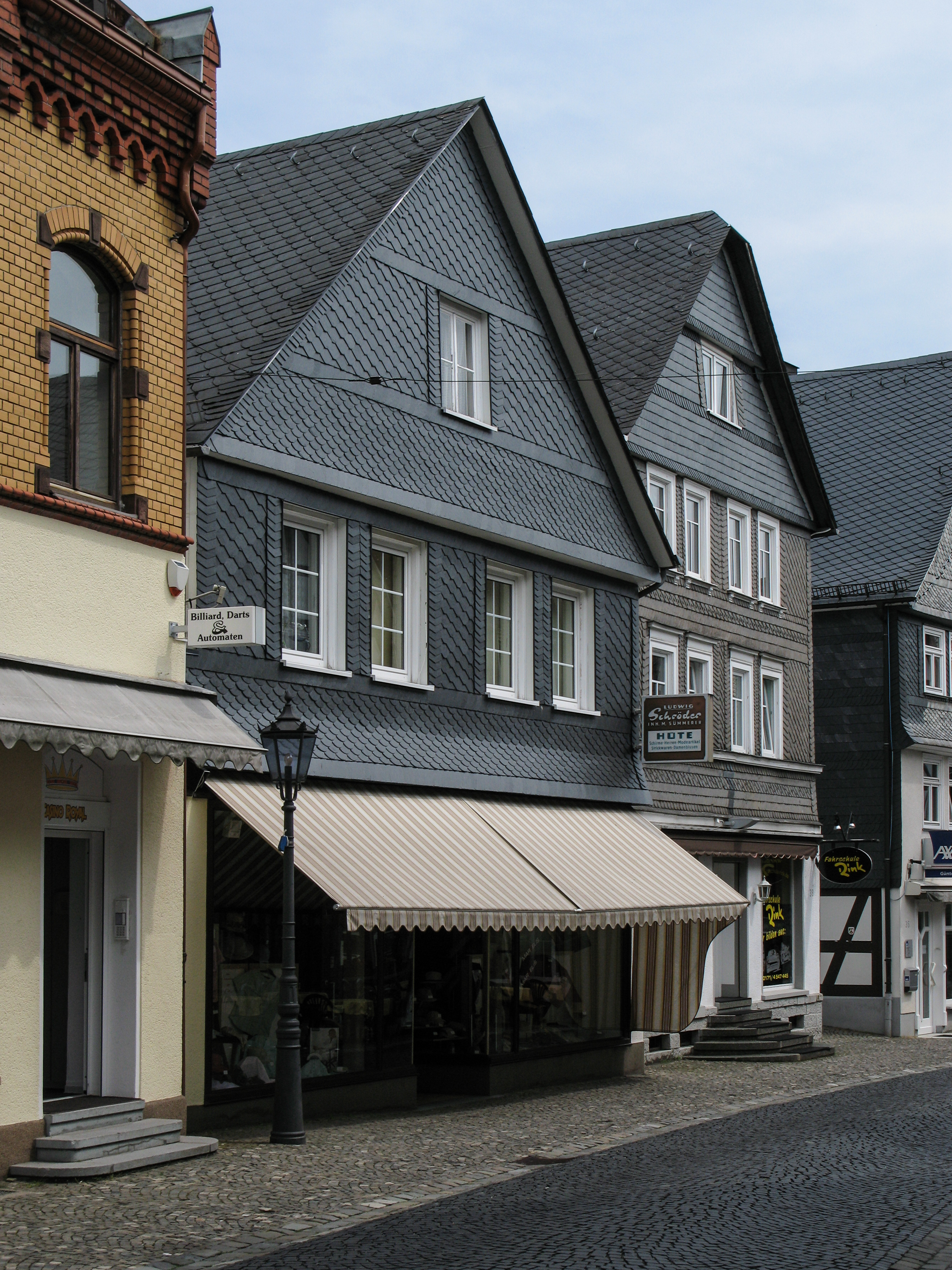 Bad Laasphe, historischer Stadtkern, historische Bürgerhäuser